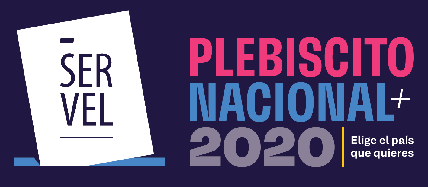 Logo Oficial del Plebiscito Nacional de Chile 2020